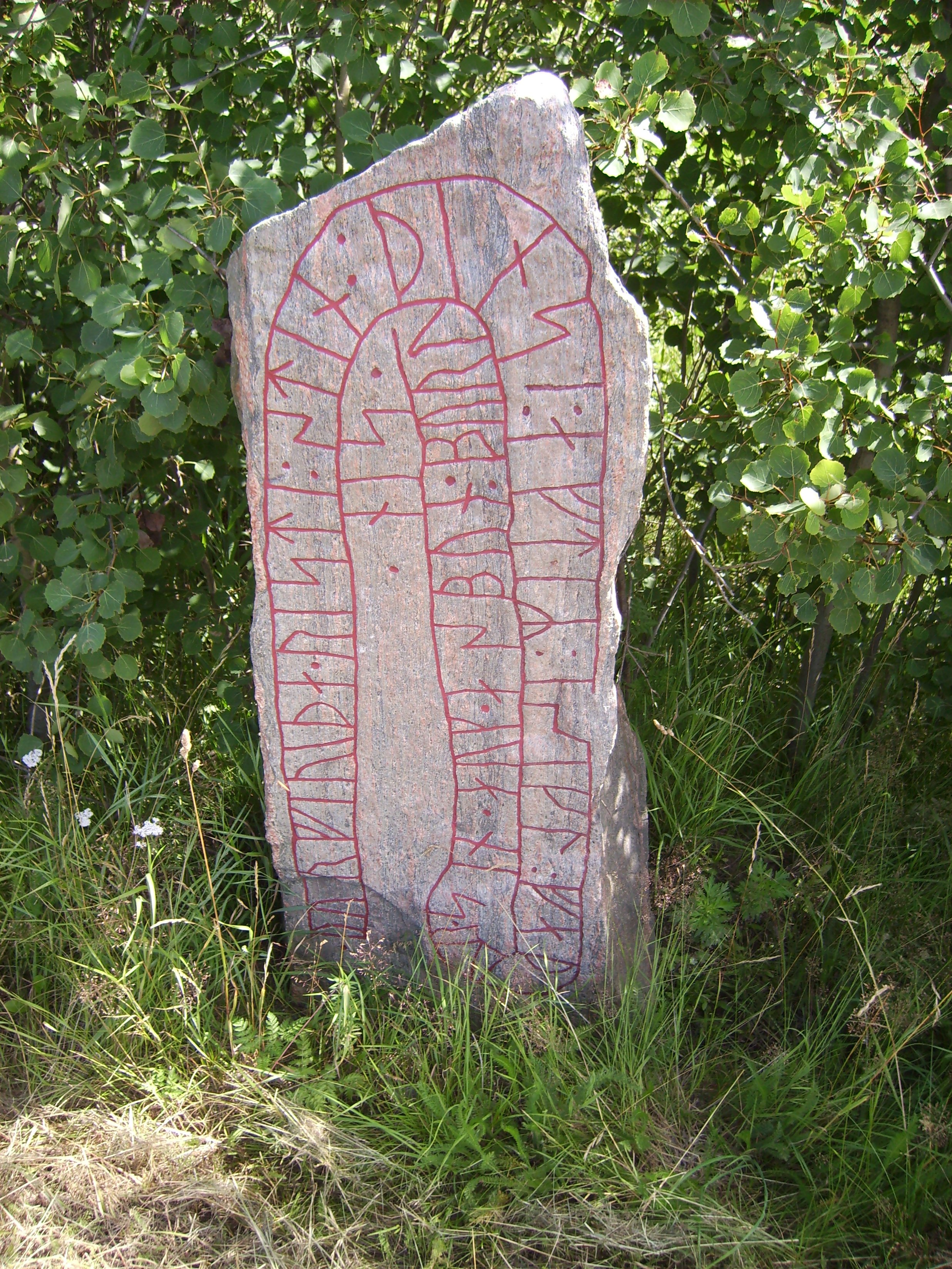 Herstaberg, Ströbo äng, The Kvillinge parish. Runestone Ög 47, Sweden.